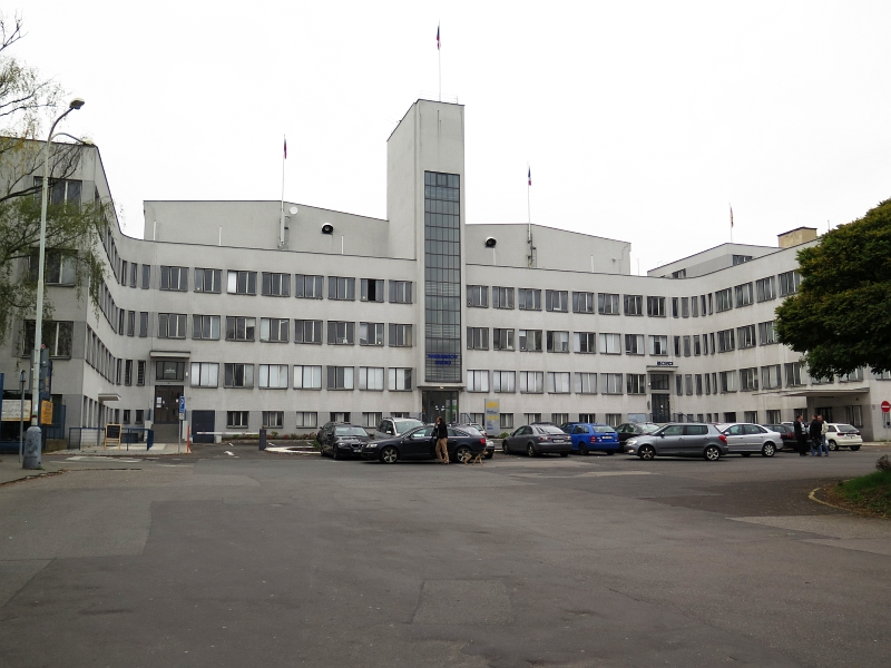 Hlavní budova filmových ateliérů, Kříženeckého náměstí 322/5, Barrandov, Praha-Hlubočepy.